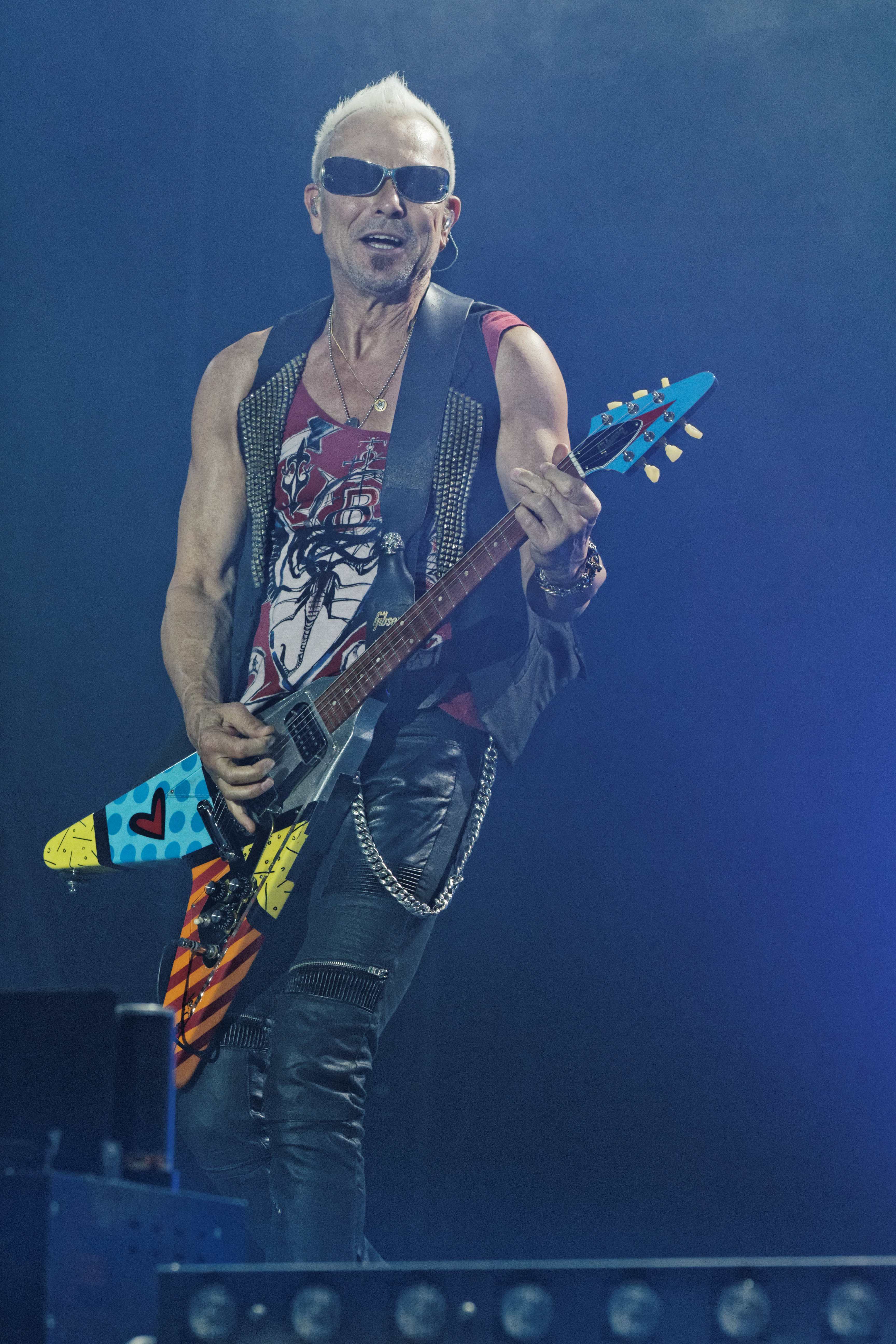 Scorpions en concert sur la grande scène lors de la fête de l'Humanité 2014.